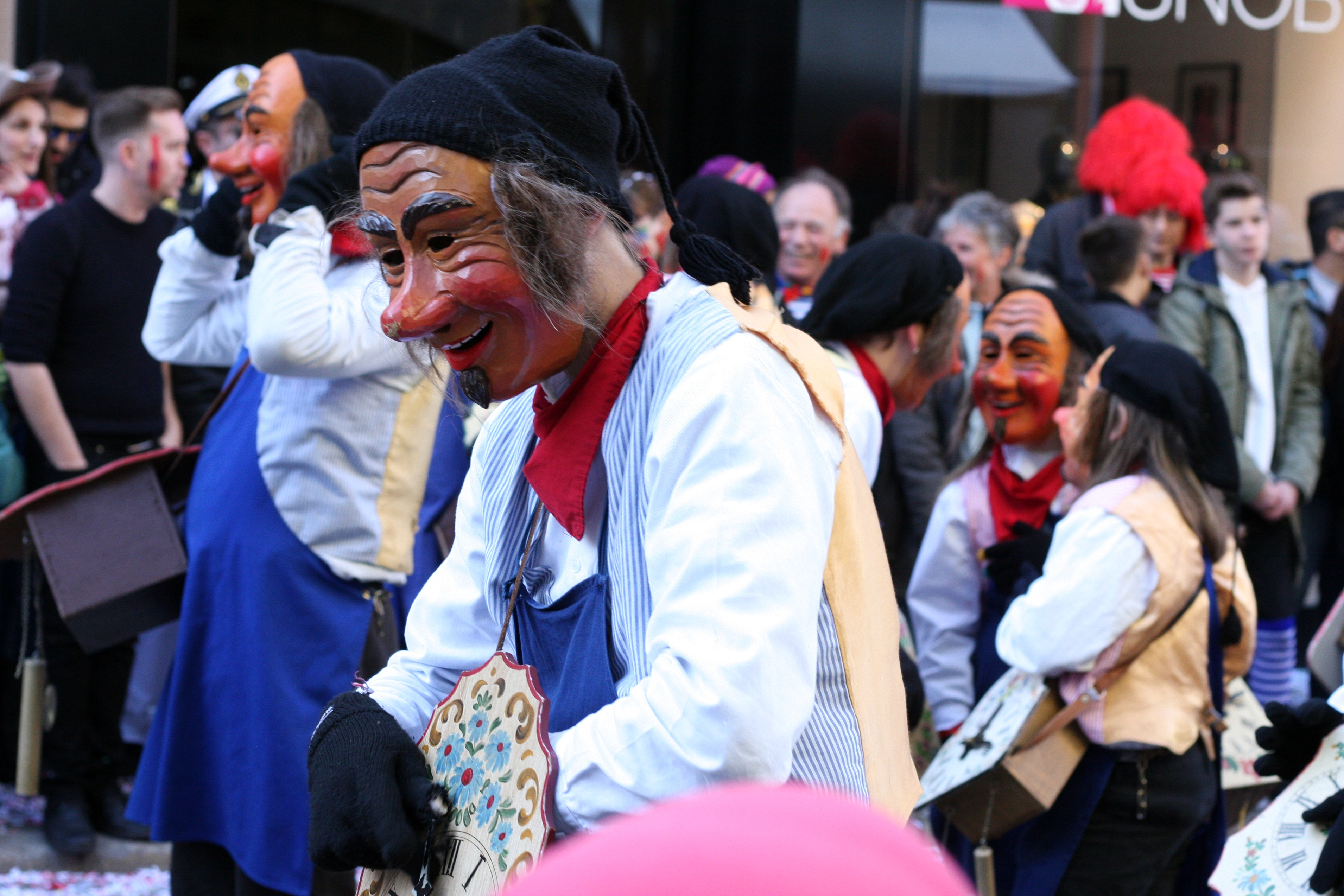 Uhrmacherzunft Oberbränd (Eisenbach/Hochschwarzwald), in Freiburg im Breisgau, Fasnetmendigumzug, 27. Februar 2017